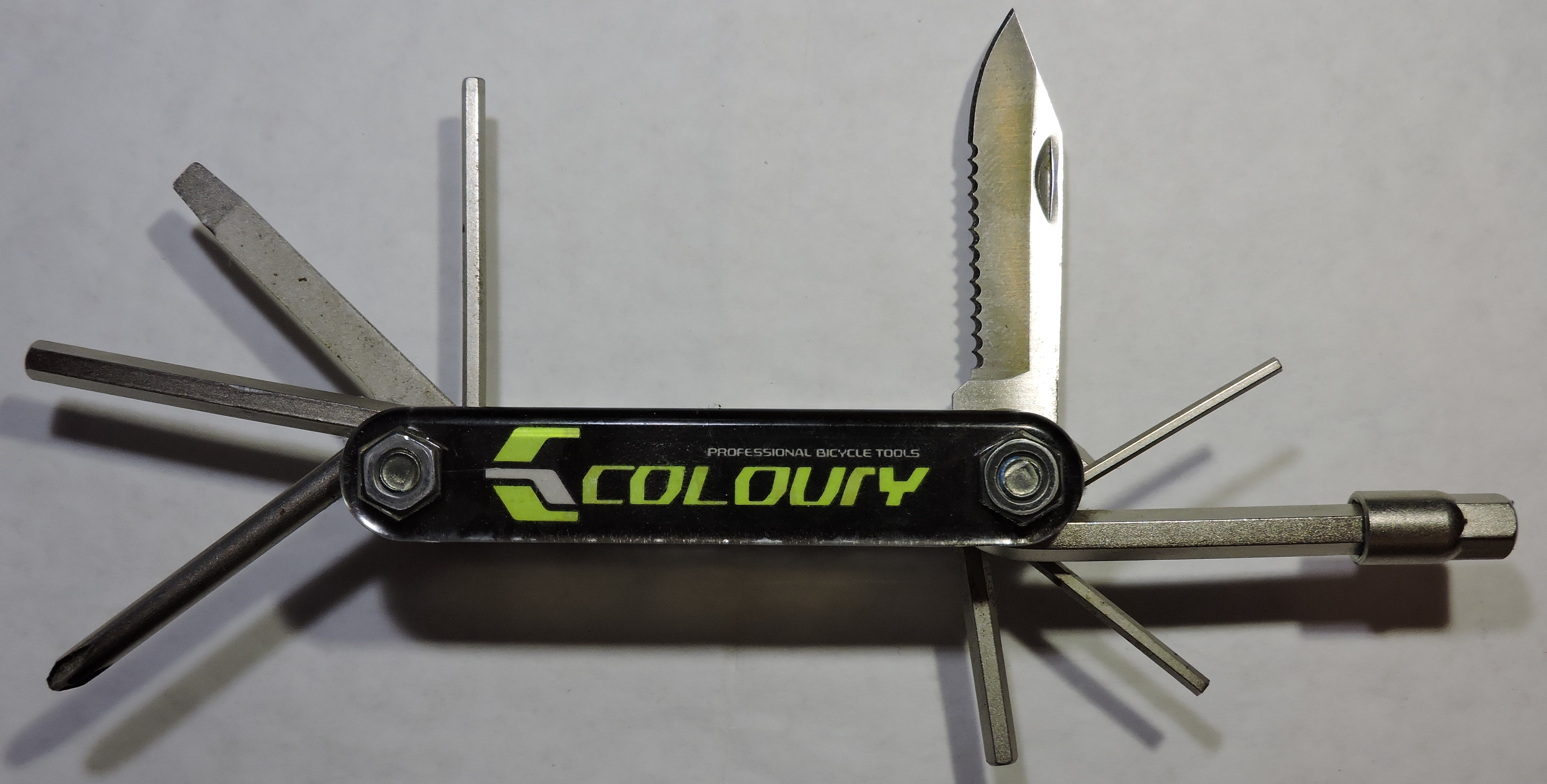 Bicycle tools